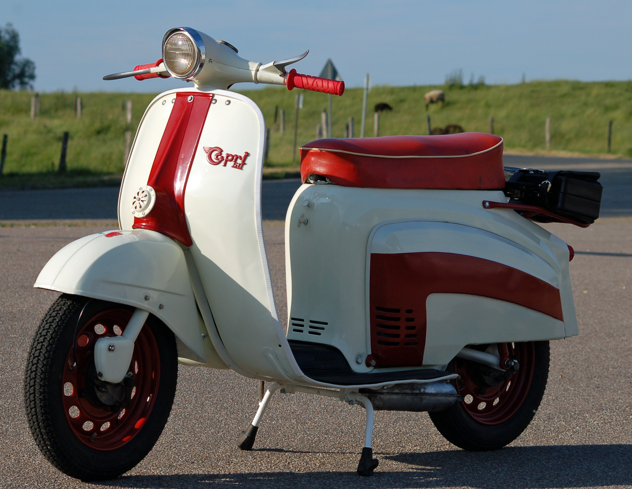 Garelli Capri Roller, Baujahr 1968